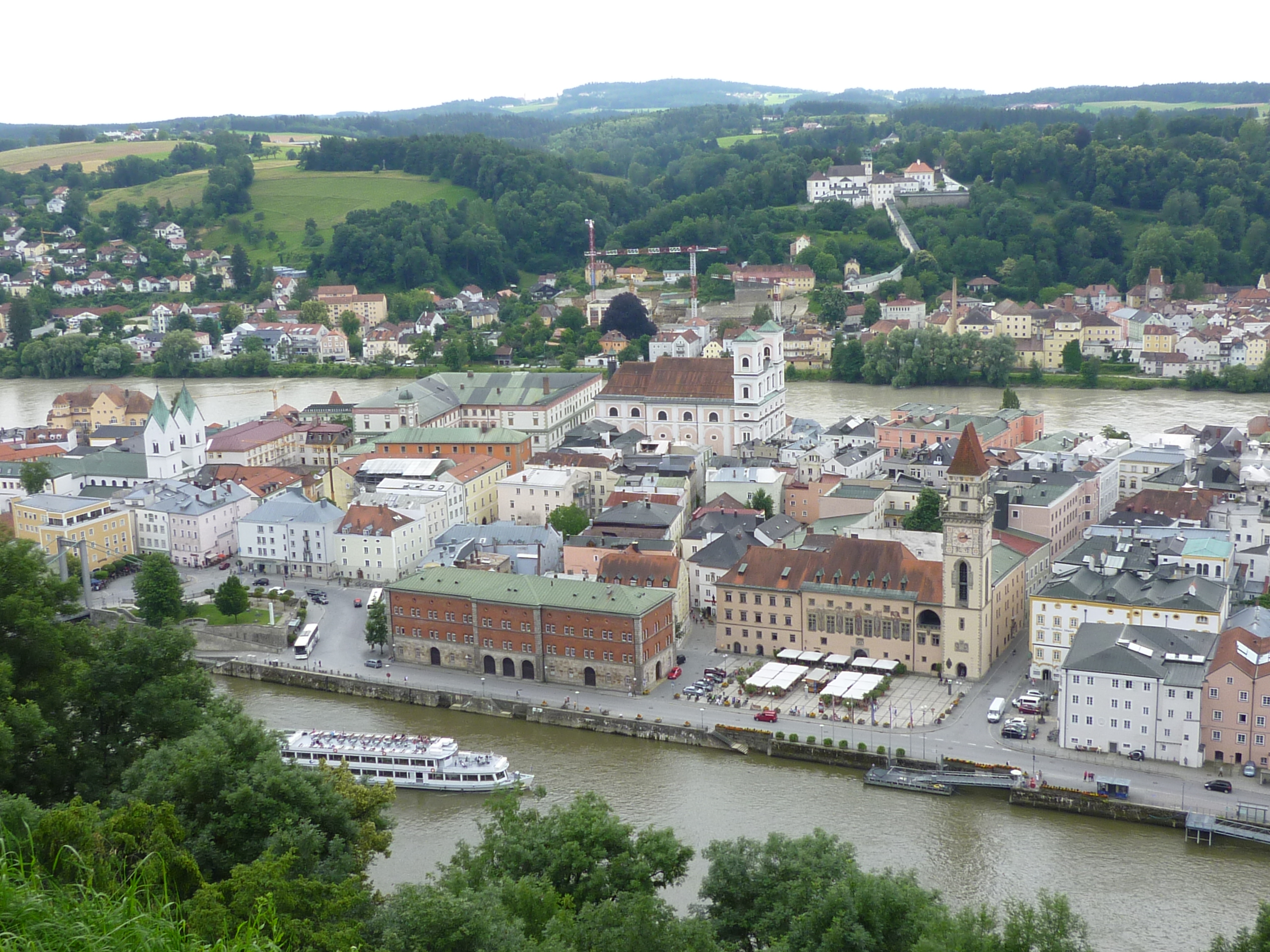 Blick von der Veste Oberhaus auf die Altstadt von Passau. Im Vordergrund ist das Rathaus und das alte Zollamt zu sehen, im Hintergrund der Mariahilf-Berg.This is a photograph of an architectural monument.